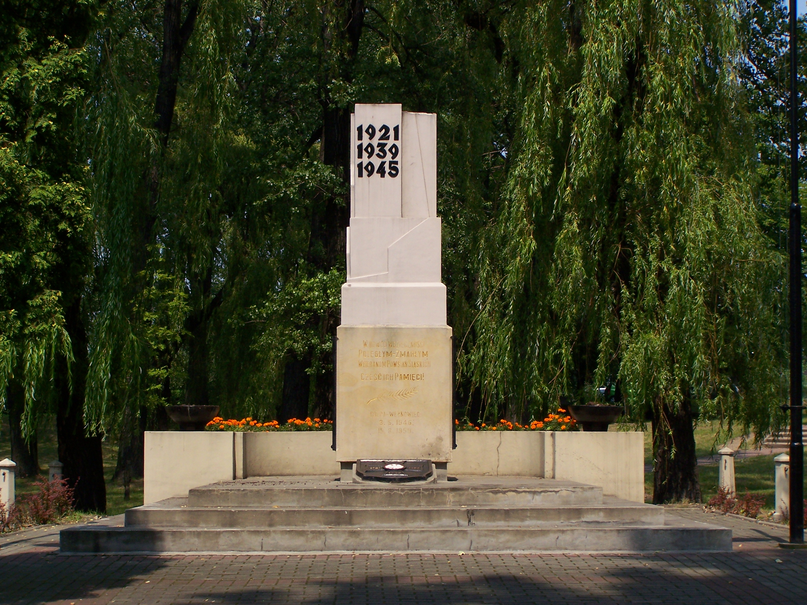 Obelisk ku czci poległych powstańców śląskich na Wełnowcu w Katowicach